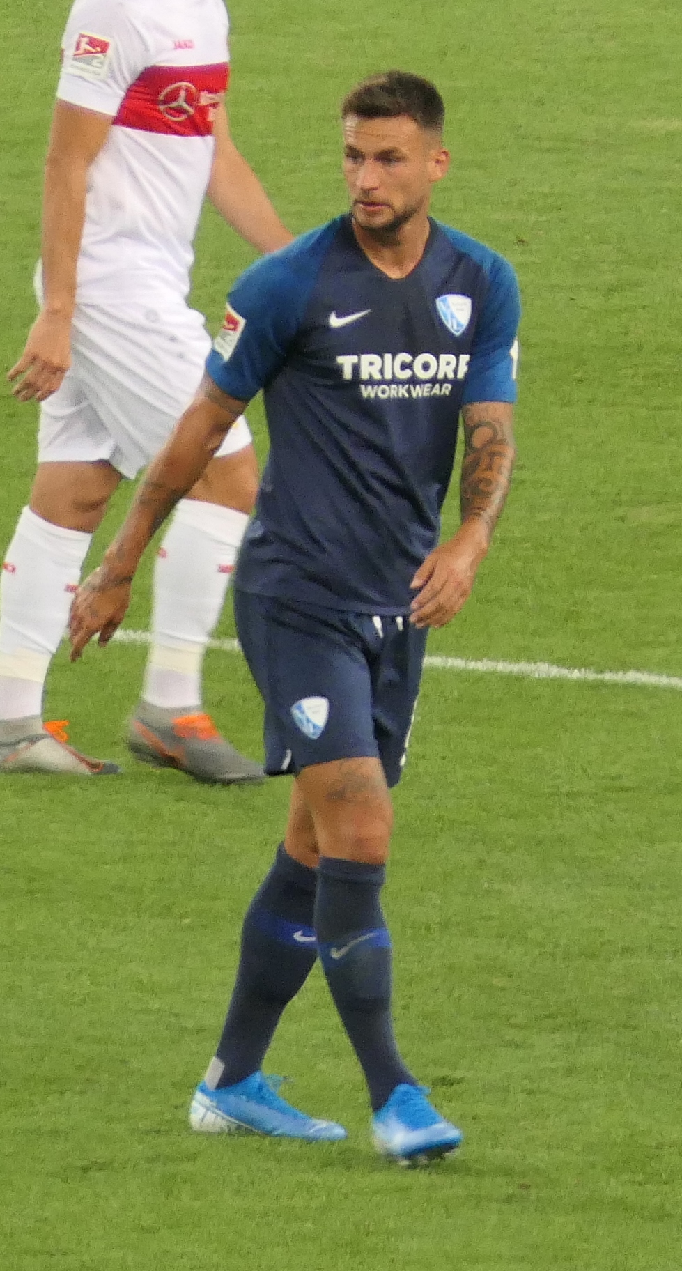 Der Fussballprofi Danny Blum im Trikot vom VfL Bochum beim Auswärtsspiel gegen den VfB Stuttgart am 02.09.2019.